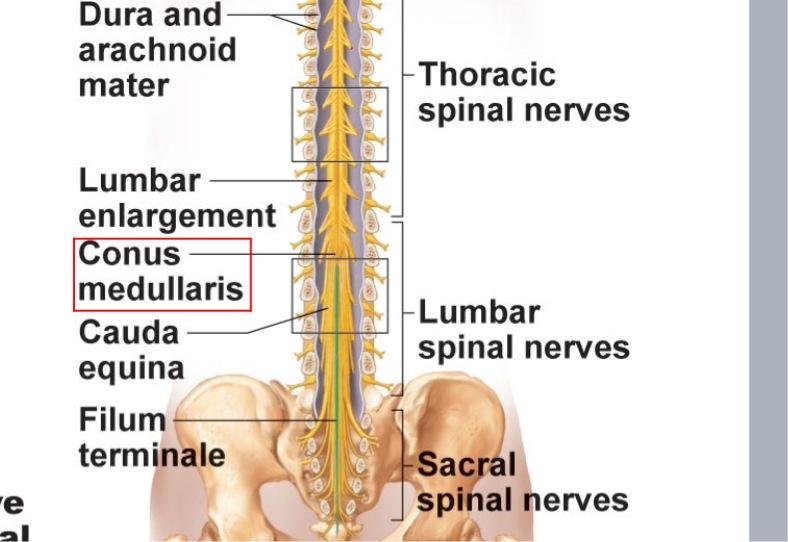 Жұлынның төменгі құрылысы